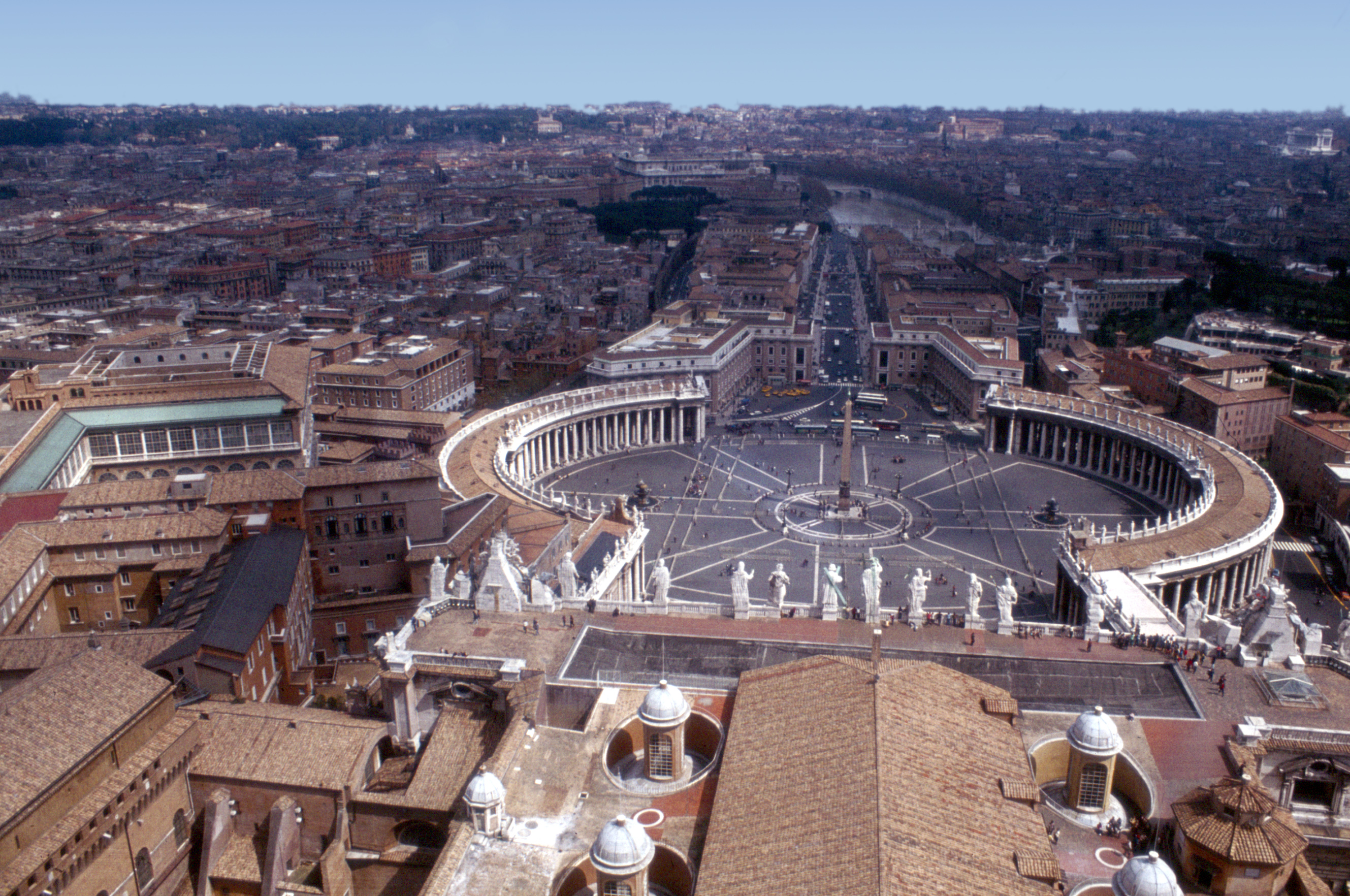 1983 in Rom